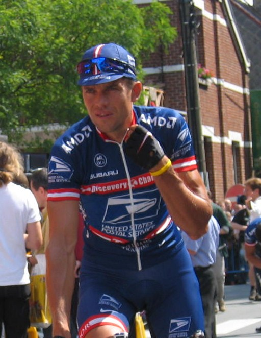 Photo prise sur le Tour de France 2004